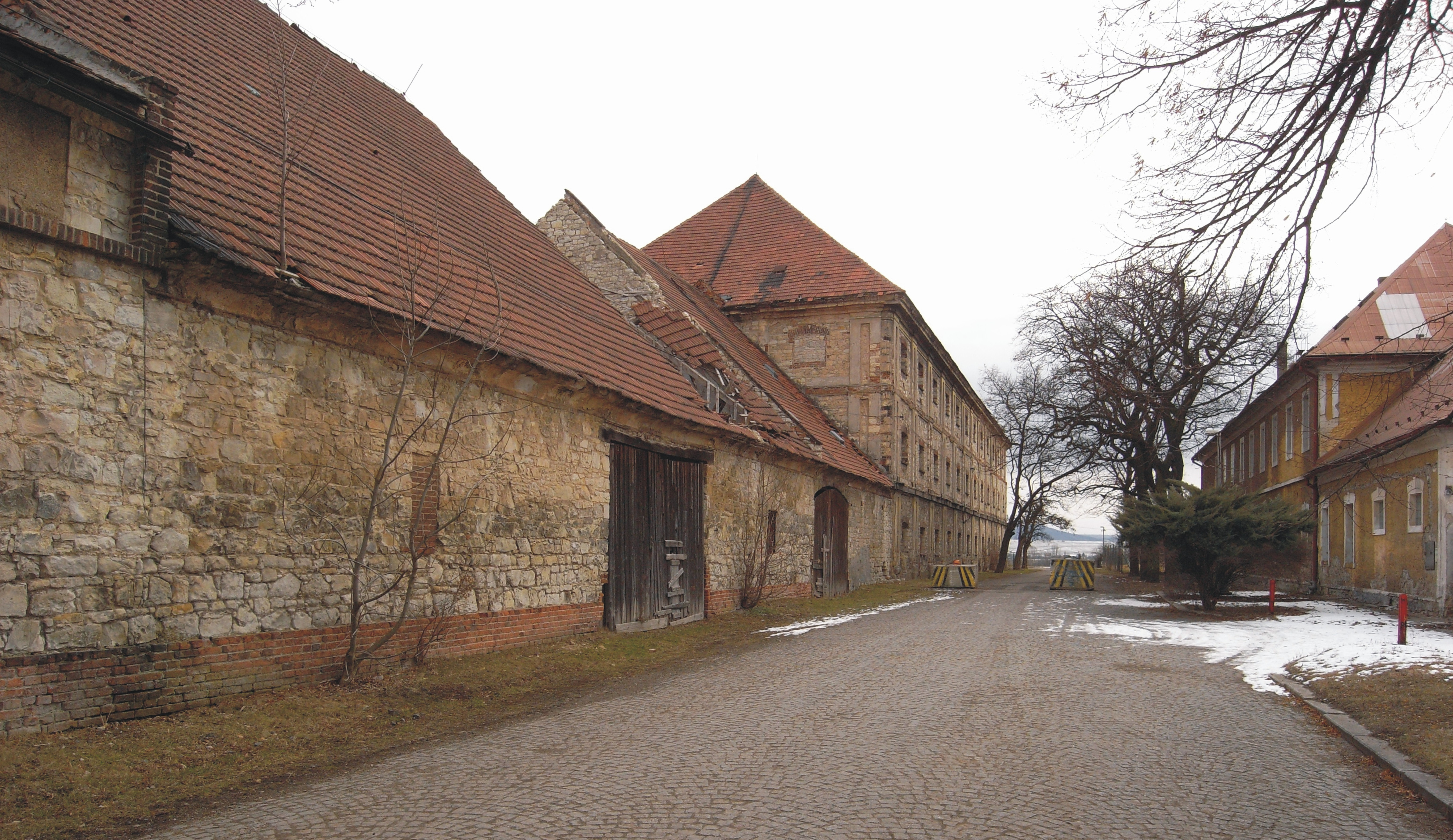 Kasernen in Postoloprty / Postelberg (Nordböhmen, Tschechische Republik) Bis 1918 k.k. Landwehr-Dragonerkaserne